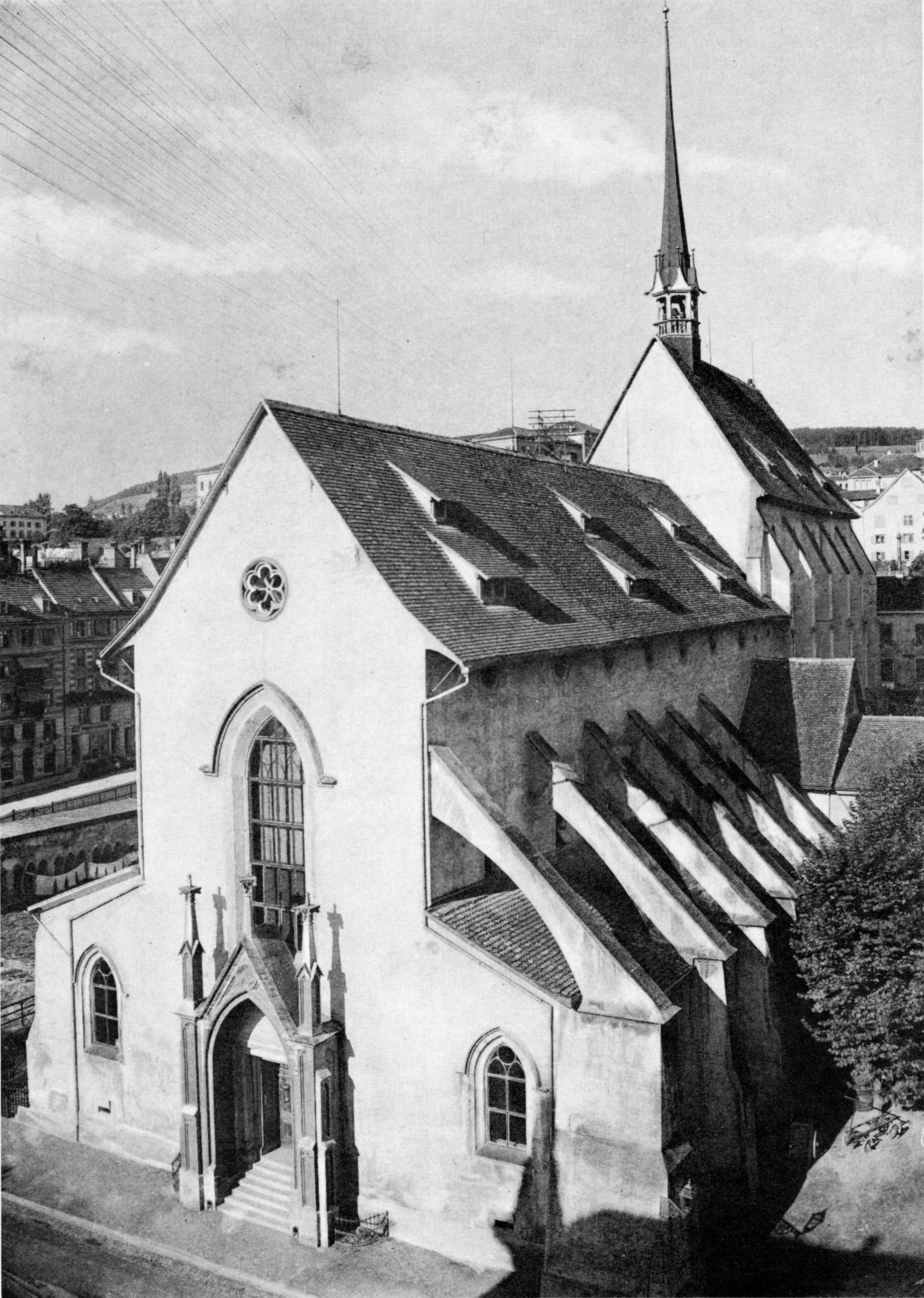 Die Predigerkirche in Zürich nach Brand und Abriss der Konventsgebäude des ehemaligen Predigerklosters 1887 und vor dem Bau des Turms 1900.